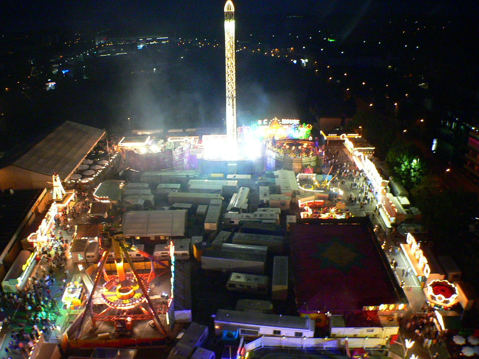 Coburger "Vogelschießen", Volksfest auf dem Anger am Rande der Innenstadt